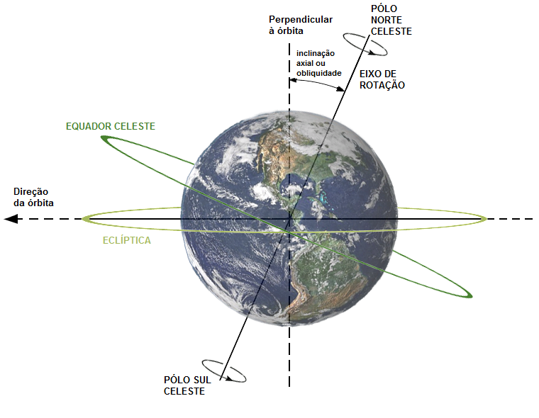 Descrição das relações entre inclinação axial (ou obliquidade), eixo de rotação, plano orbital, equador celeste e eclíptica. A Terra é mostrada como é vista do Sol; a direção da órbita é anti-horária (para a esquerda). Description of relations between Axial tilt (or Obliquity), rotation axis, plane of orbit, celestial equator and ecliptic. Earth is shown as viewed from the Sun; the orbit direction is counter-clockwise (to the left).